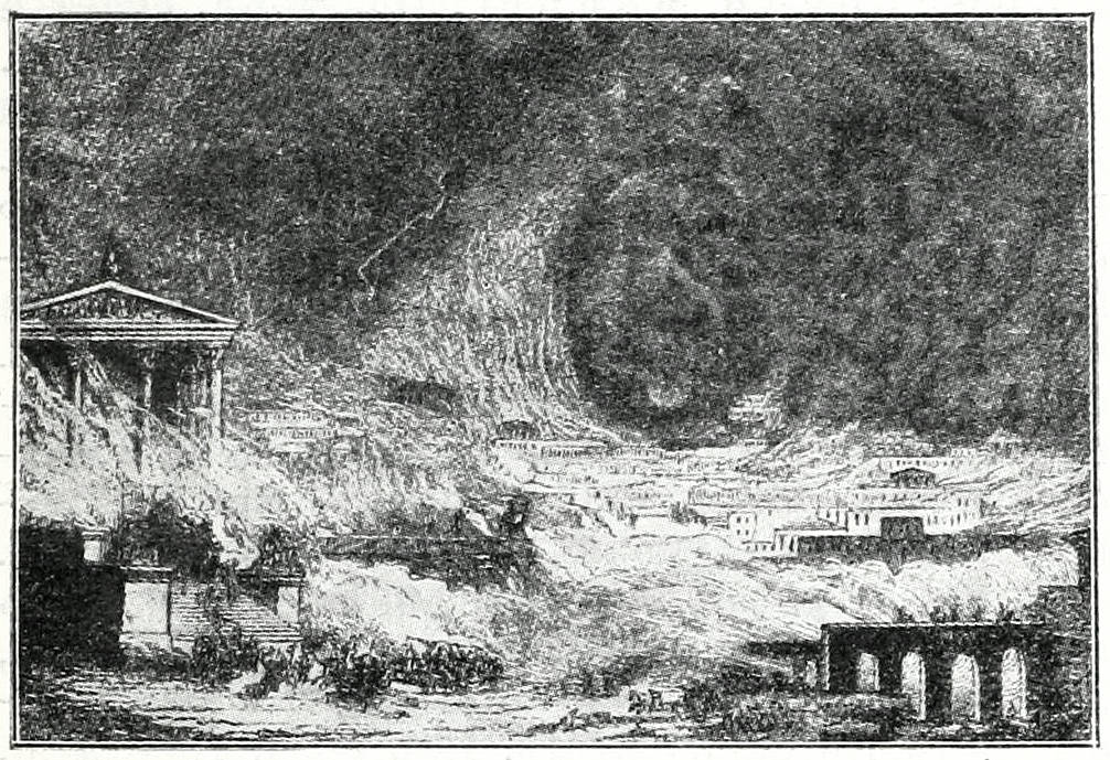 Это изо было использовано в статье «Греко-римская война» опубликованной в восьмом томе «Военной энциклопедии», который был издан книгоиздательским товариществом И. Д. Сытина в 1912 году в столице Российской империи городе Санкт-Петербурге.